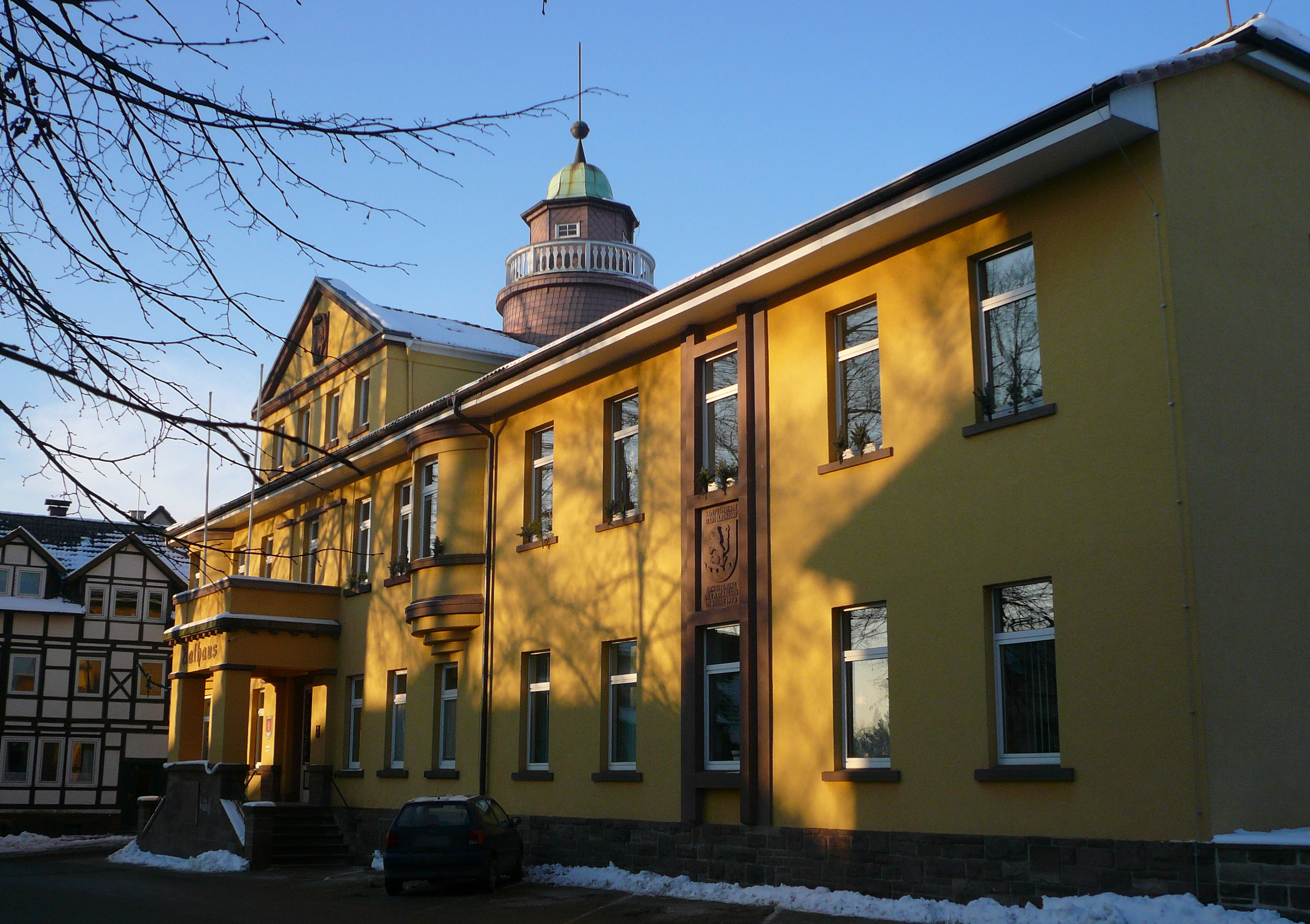 Rathaus in Stadtoldendorf, Landkreis Holzminden, Niedersachsen